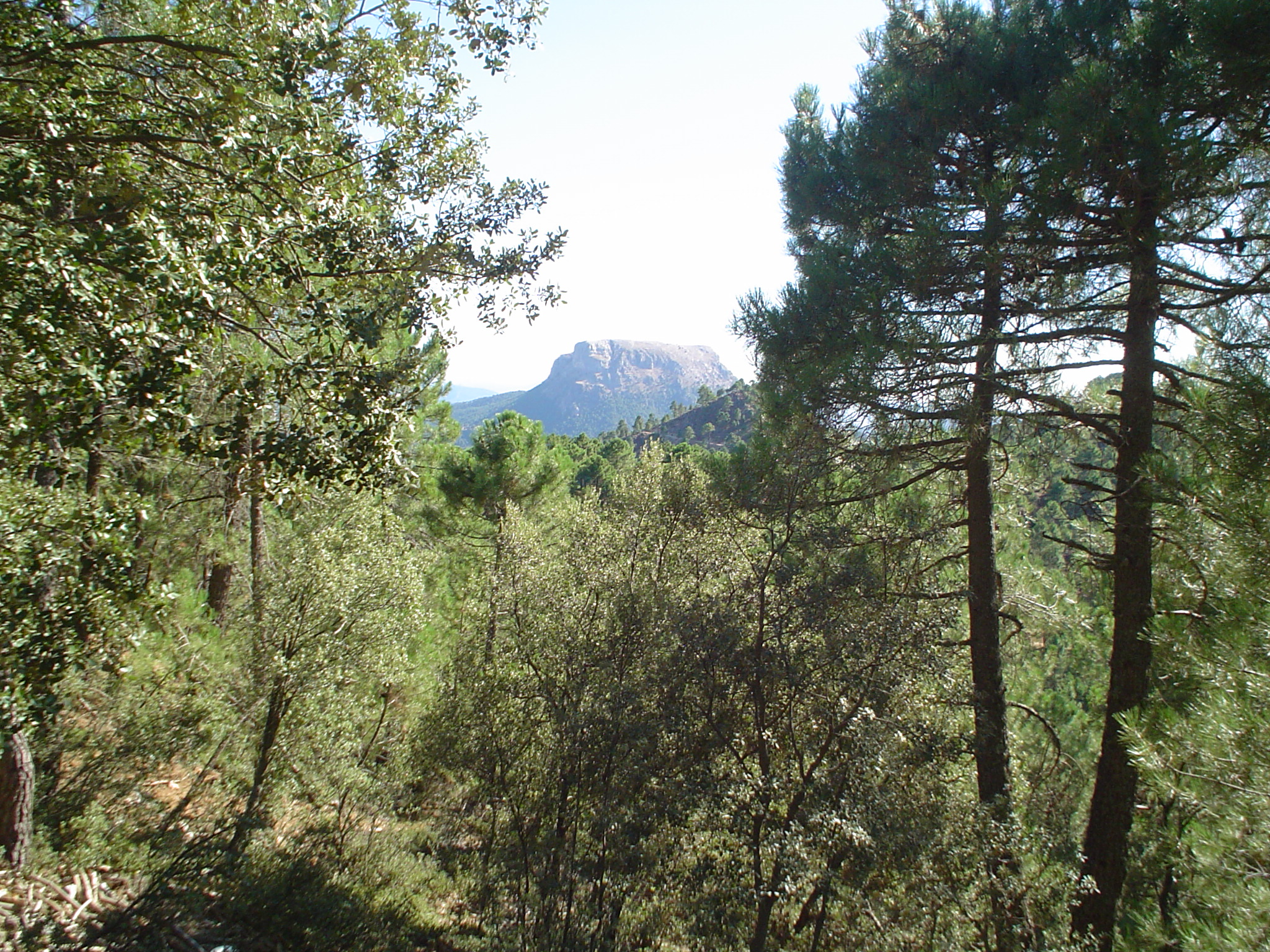 Fotografía tomada desde el camino que sube al Pico de la Sarga, hacia la Piedra del Cambrón (al fondo), en Villaverde de Guadalimar (Albacete)